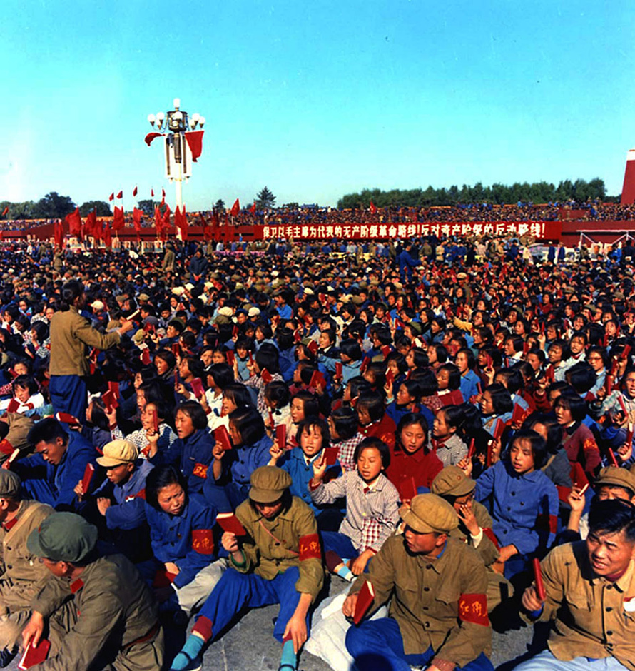 1966年9月15日，等待接见的红卫兵.